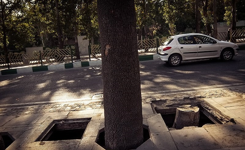 نفس های بریده